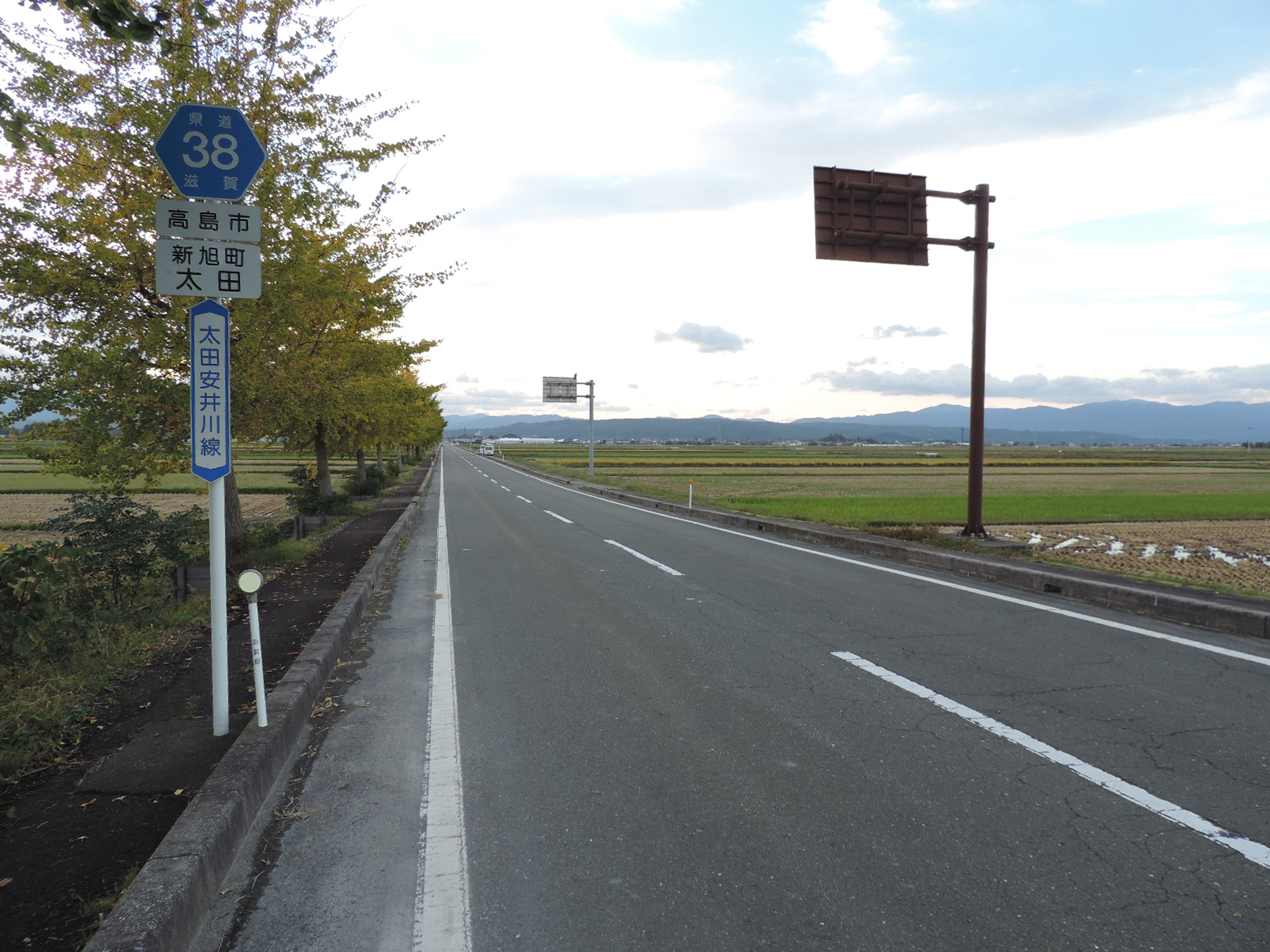 滋賀県道38号太田安井川線。滋賀県高島市新旭町太田にて。2017年撮影。